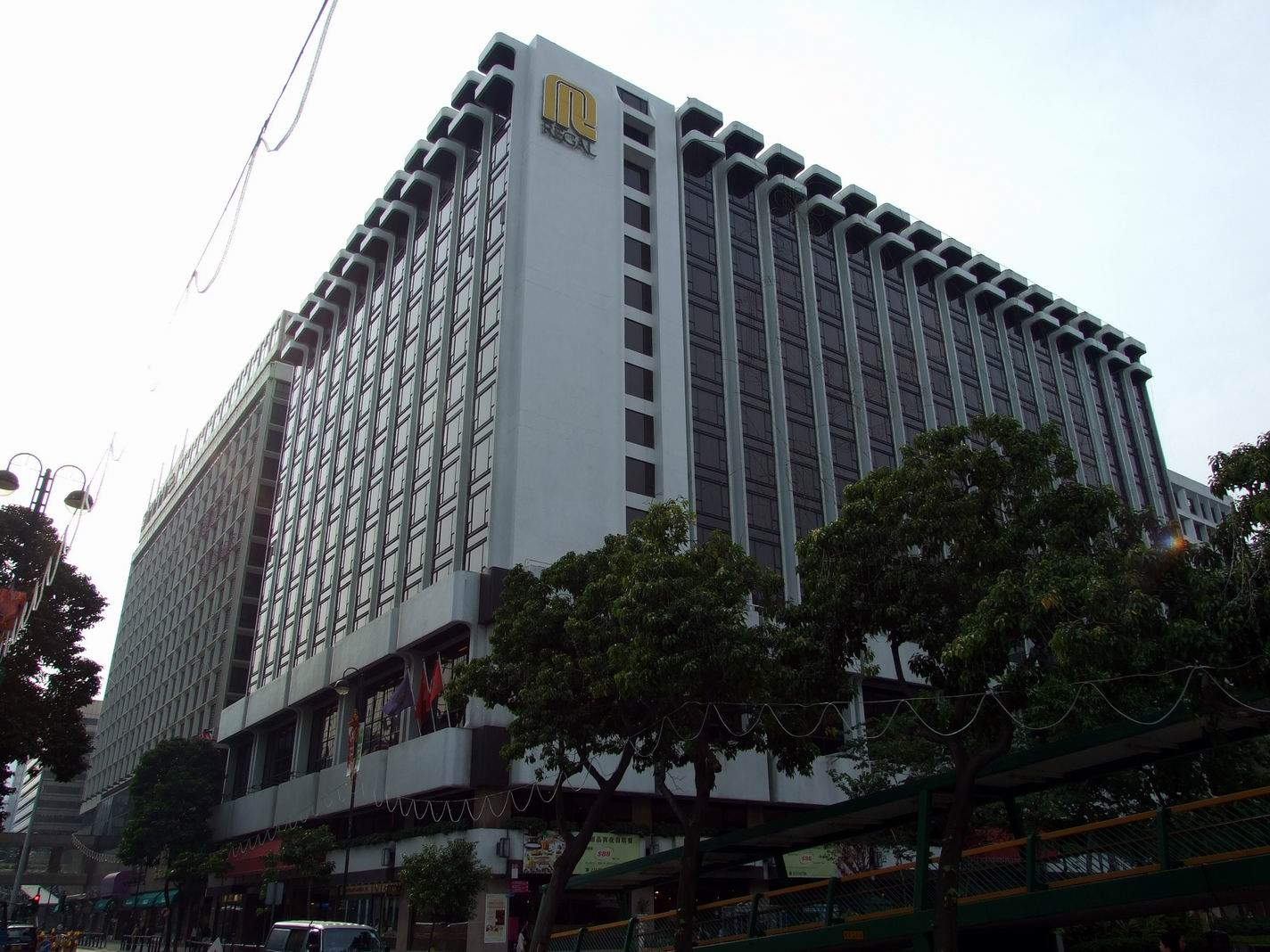 尖東zh:香港富豪九龍酒店